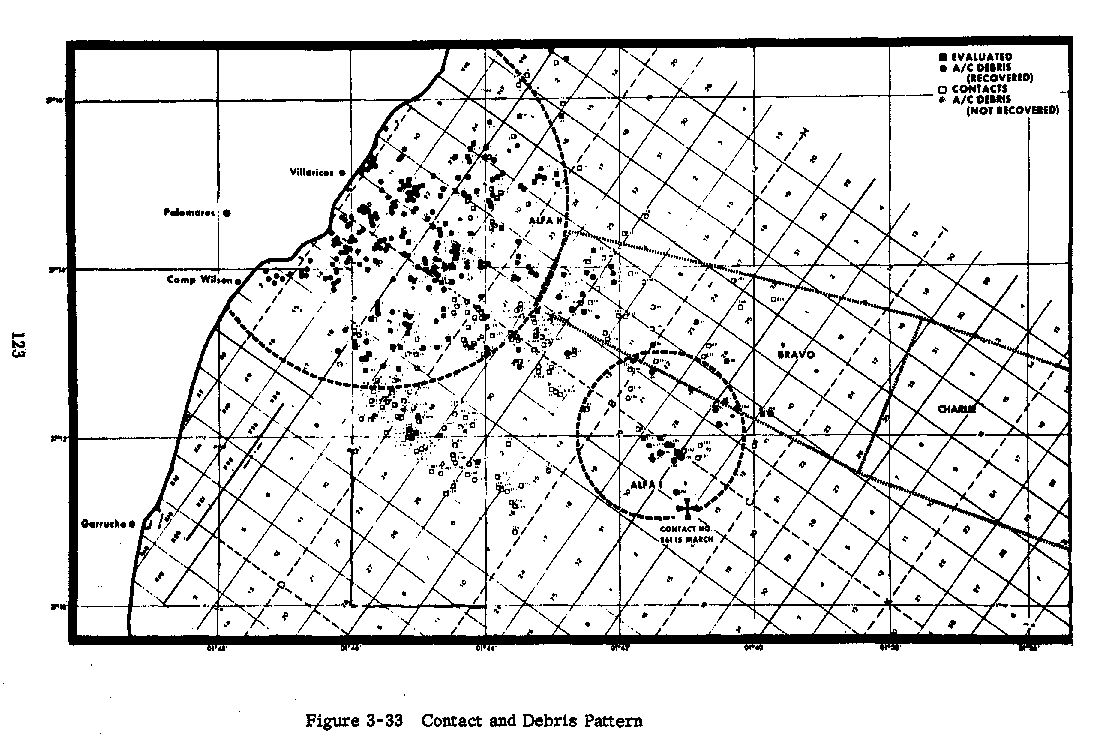 Nuklearunglück von Palomares: Suchgebiet der im Meer versunkenen Wasserstoffbombe